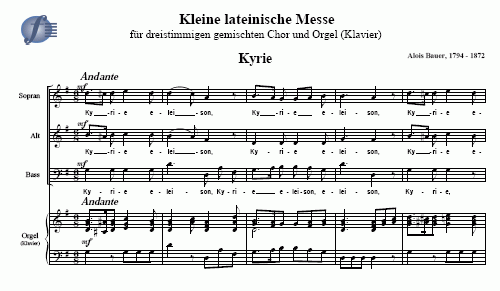 уривок з твору Алоїза Бауера "Мала латинська меса"